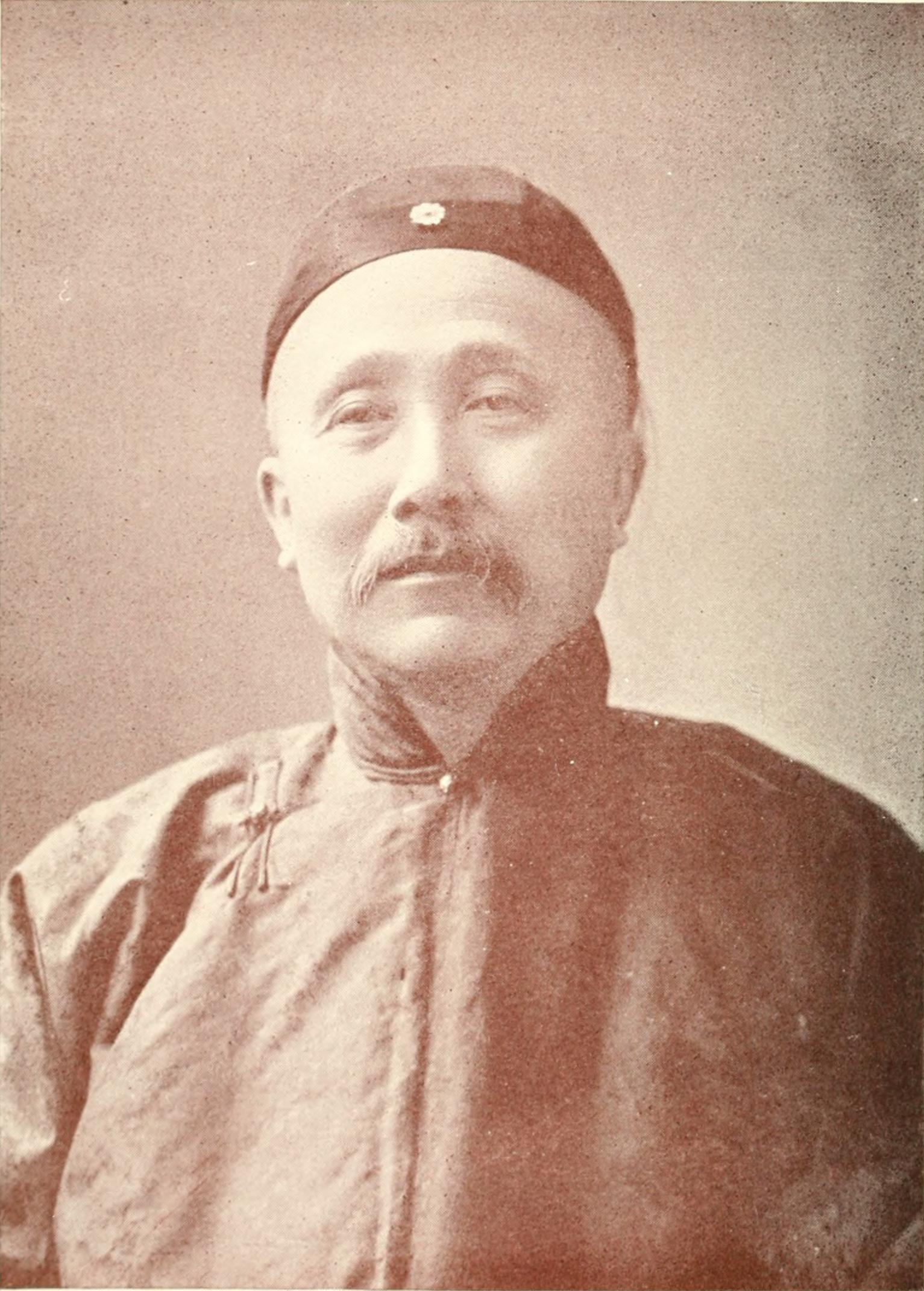 Wu Ting-Fang